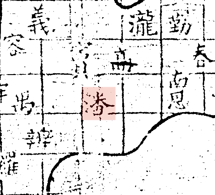 粵語: 禹跡圖中嘅潘州